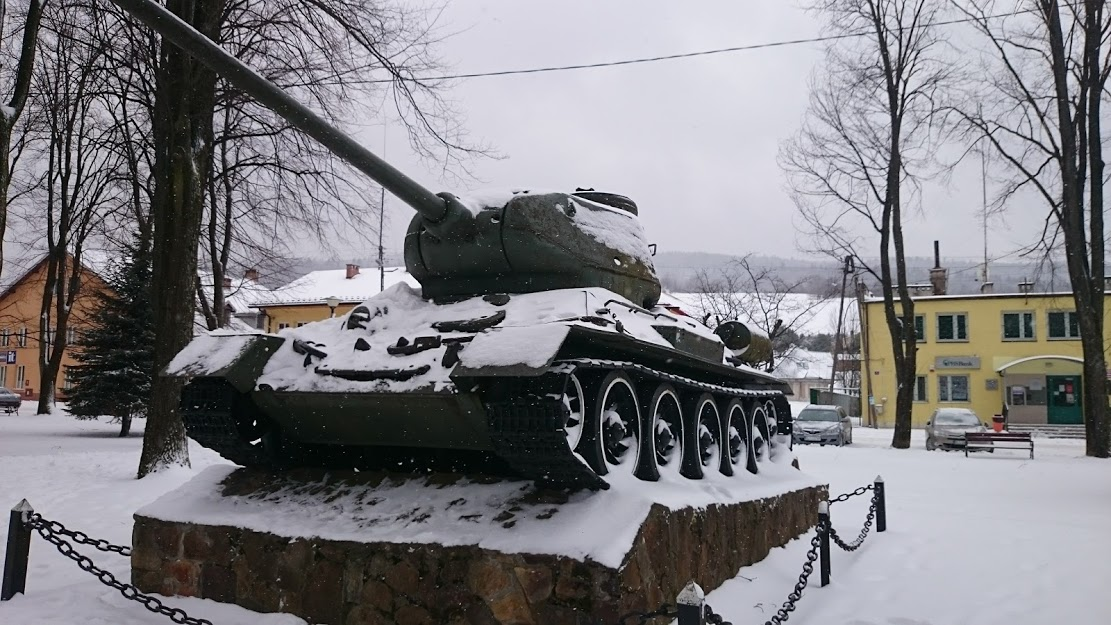 Czołg T-34 w centrum Baligrodu w grudniu 2016